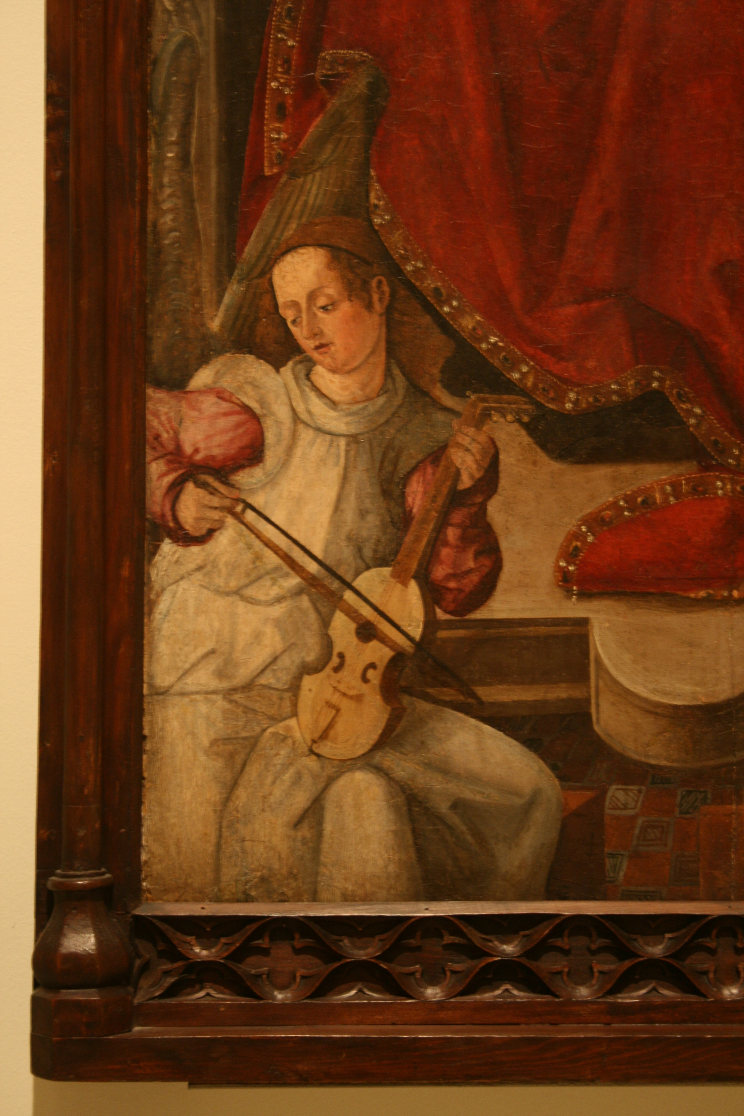 detail: viola d'arc